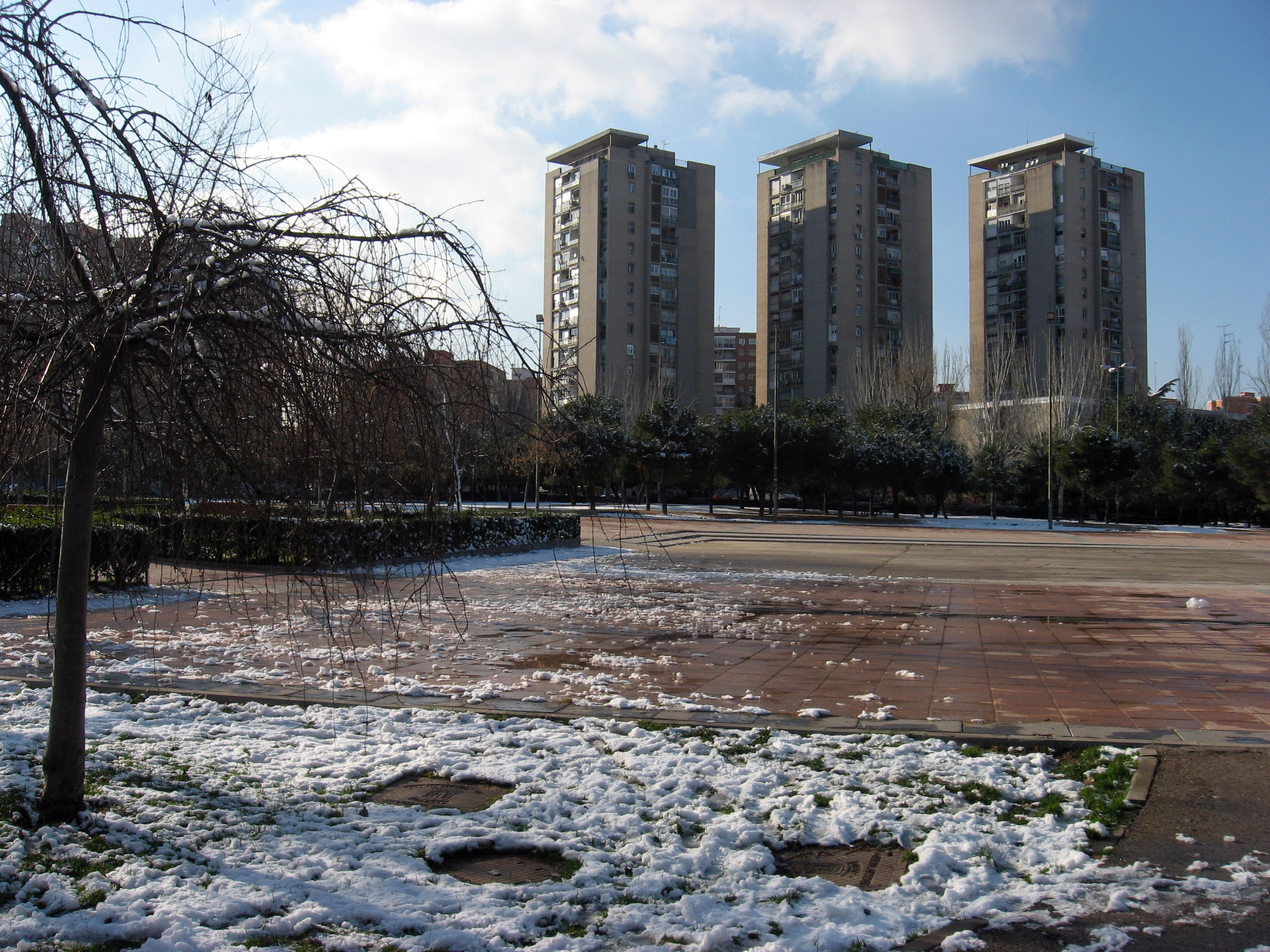 Nevada Madrid 2K9